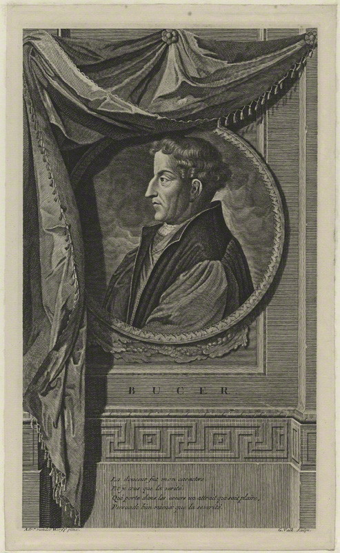 Line engraving of Martin Bucer (Butzer) by Gerard Valck, after Adriaen van der Werff